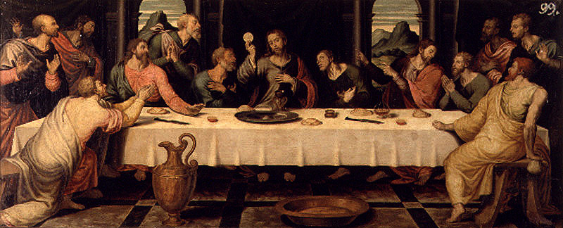 La obra representa a Jesucristo instituyendo el sacramento de la Eucaristía durante su última cena con sus discípulos.